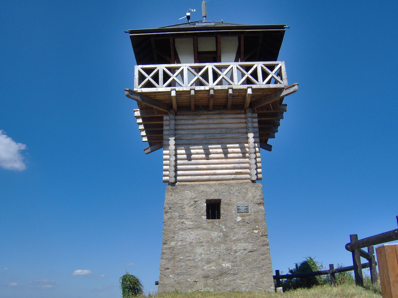 Stefansturm - Archäologisch fehlerhafte Rekonstruktion des Limeswachturms Wp 1/84 auf dem „Großen Kopf“ bei Arzbach/Westerwald.